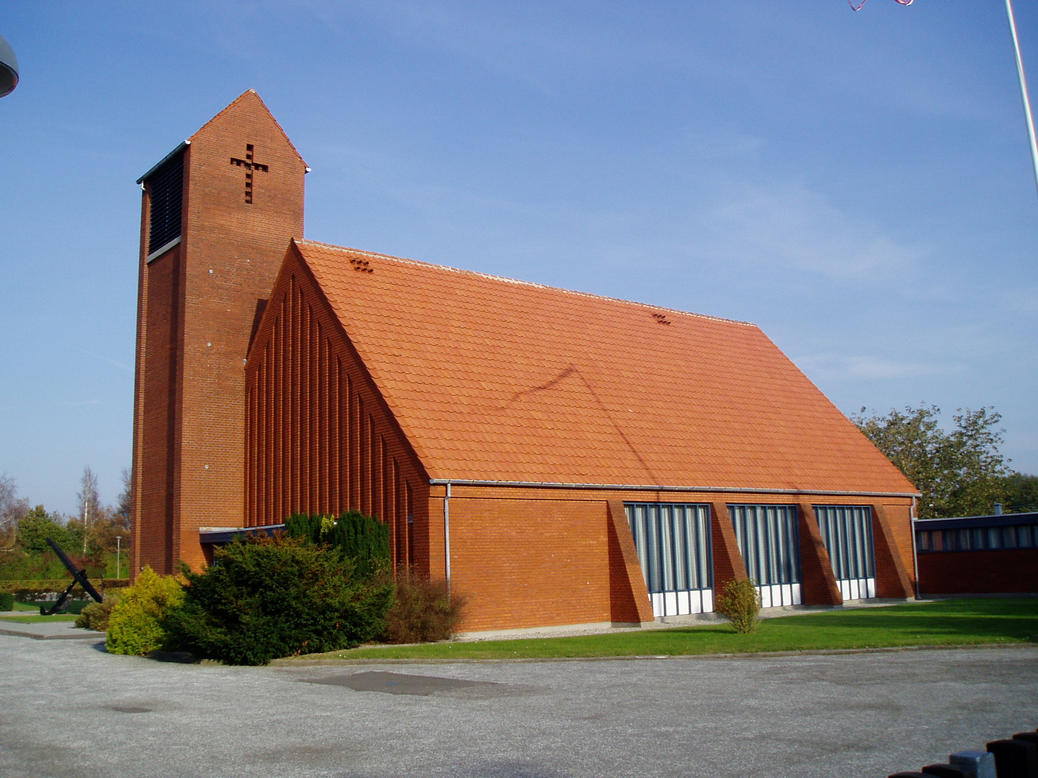 Dette er Rødbyhavn Kirke